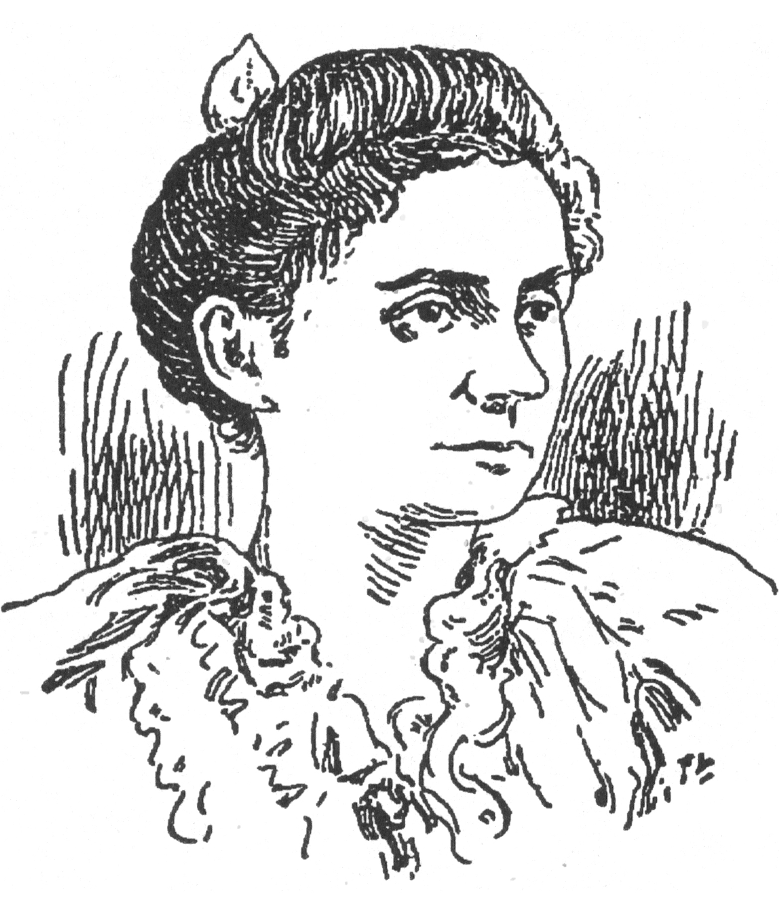 Sujet: Mary Proctor (1862-1957), Astronomin Auteur: User: Jamcelsus Source: The New York Times, Sept. 9, 1894 Lizenz: Domaine public